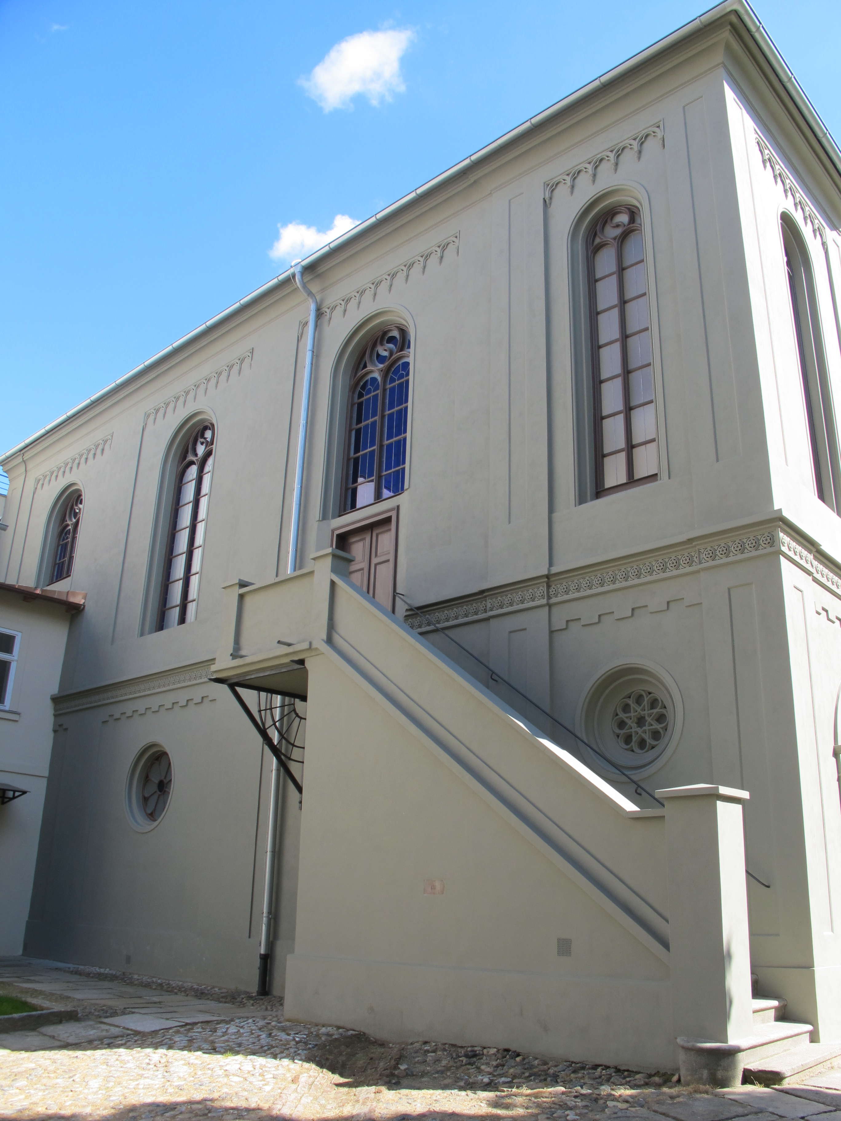 Stará synagoga se židovskou školou, Plzeň 3-Jižní Předměstí, Smetanovy sady